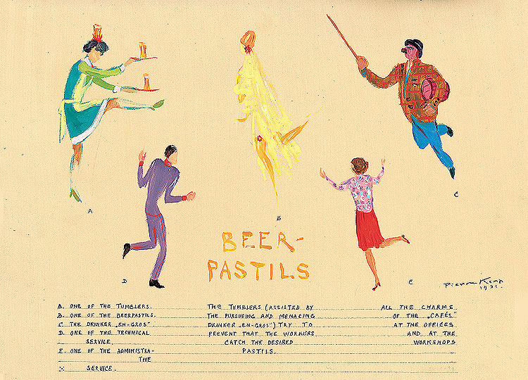 Beer-pastils (deel van Revuetaferelen) door Pierre Kemp